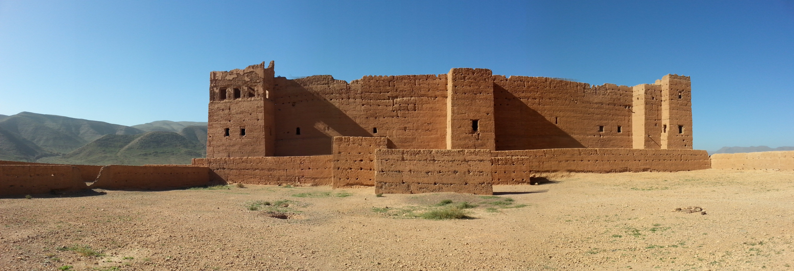 Casbah de Tawrirte.